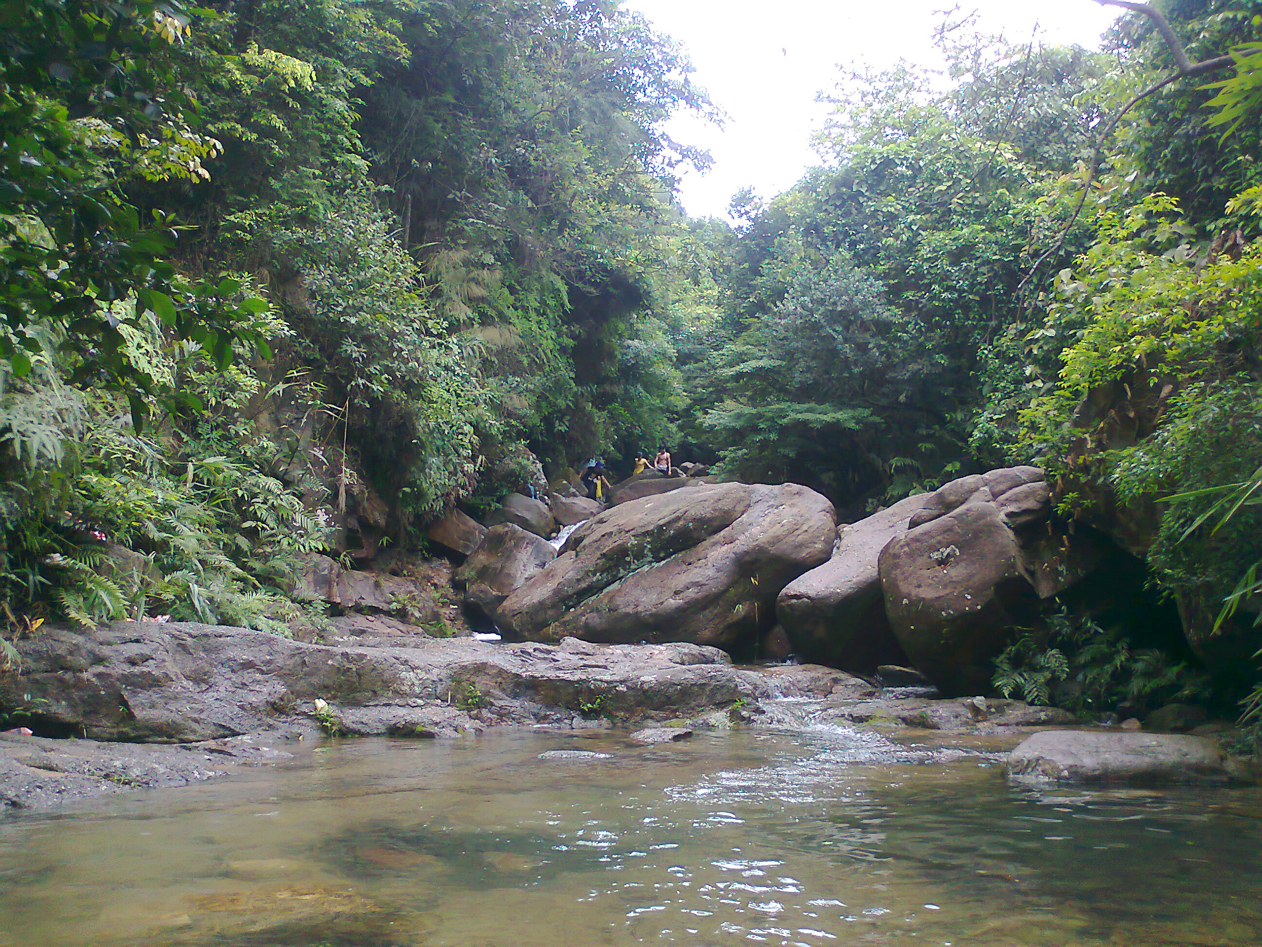 Tp. Uông Bí, tỉnh Quảng Ninh, Việt Nam